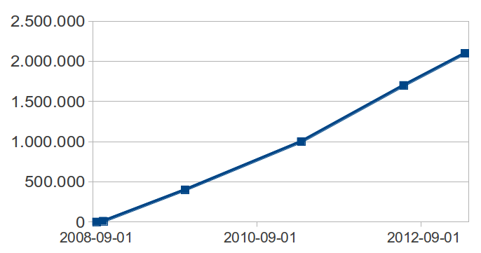 Количество зарегистрированных пользователей портала tvidi.ru. Данные взяты из: 1, 2, 3, 4, 5